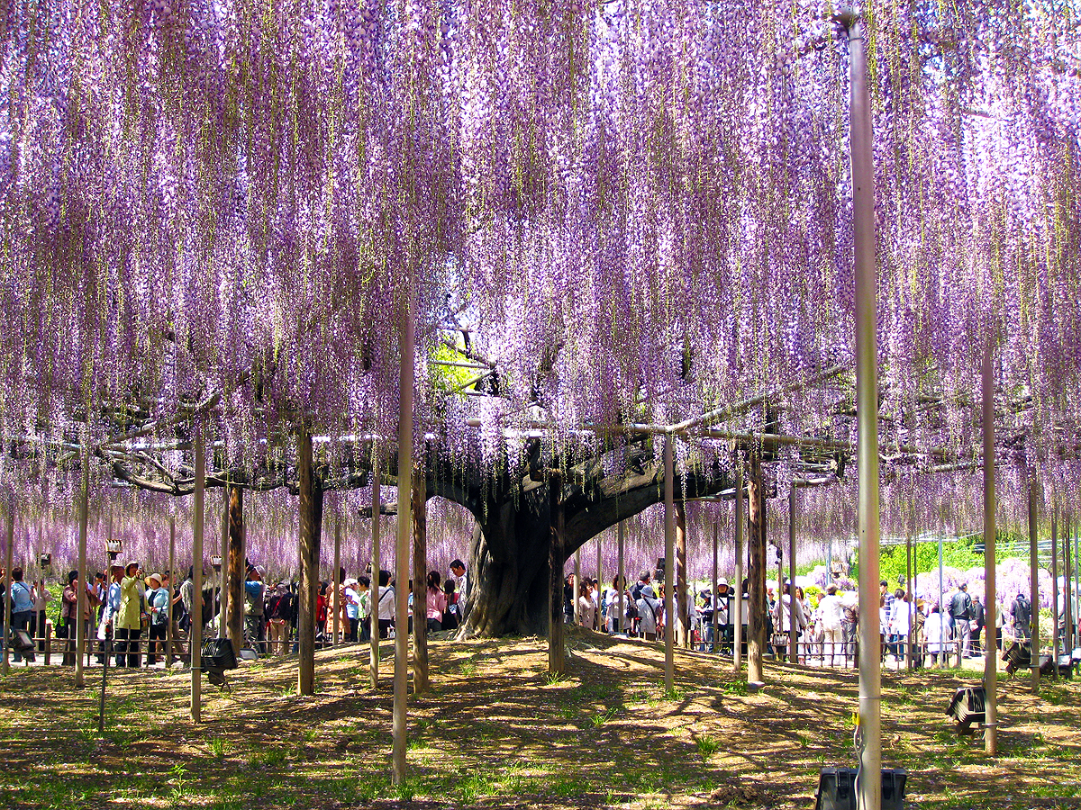 足利の藤 (Wisteria trellises in Ashikaga) 29 Apr, 2009